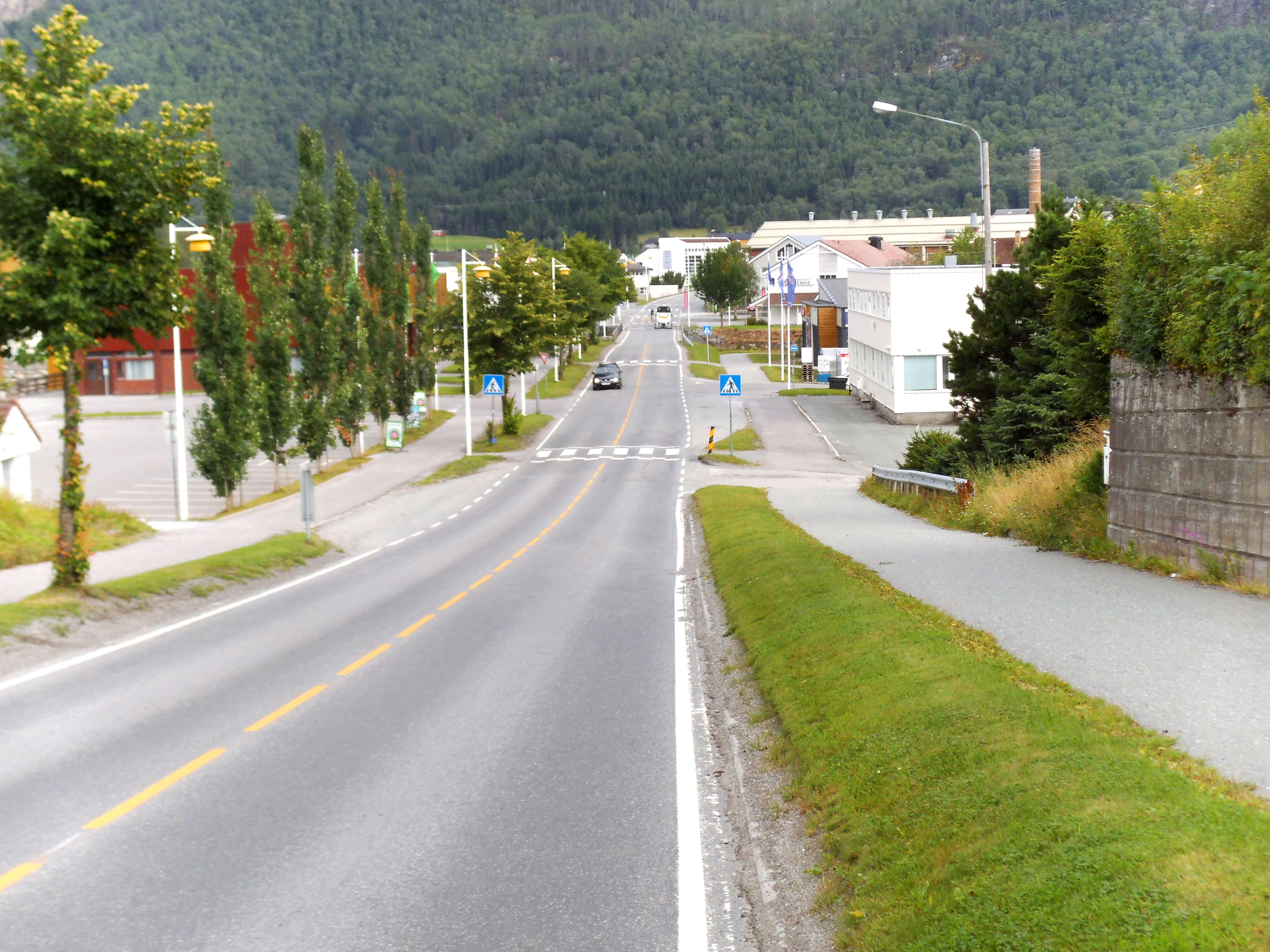 Kyrksæterøra sentrum